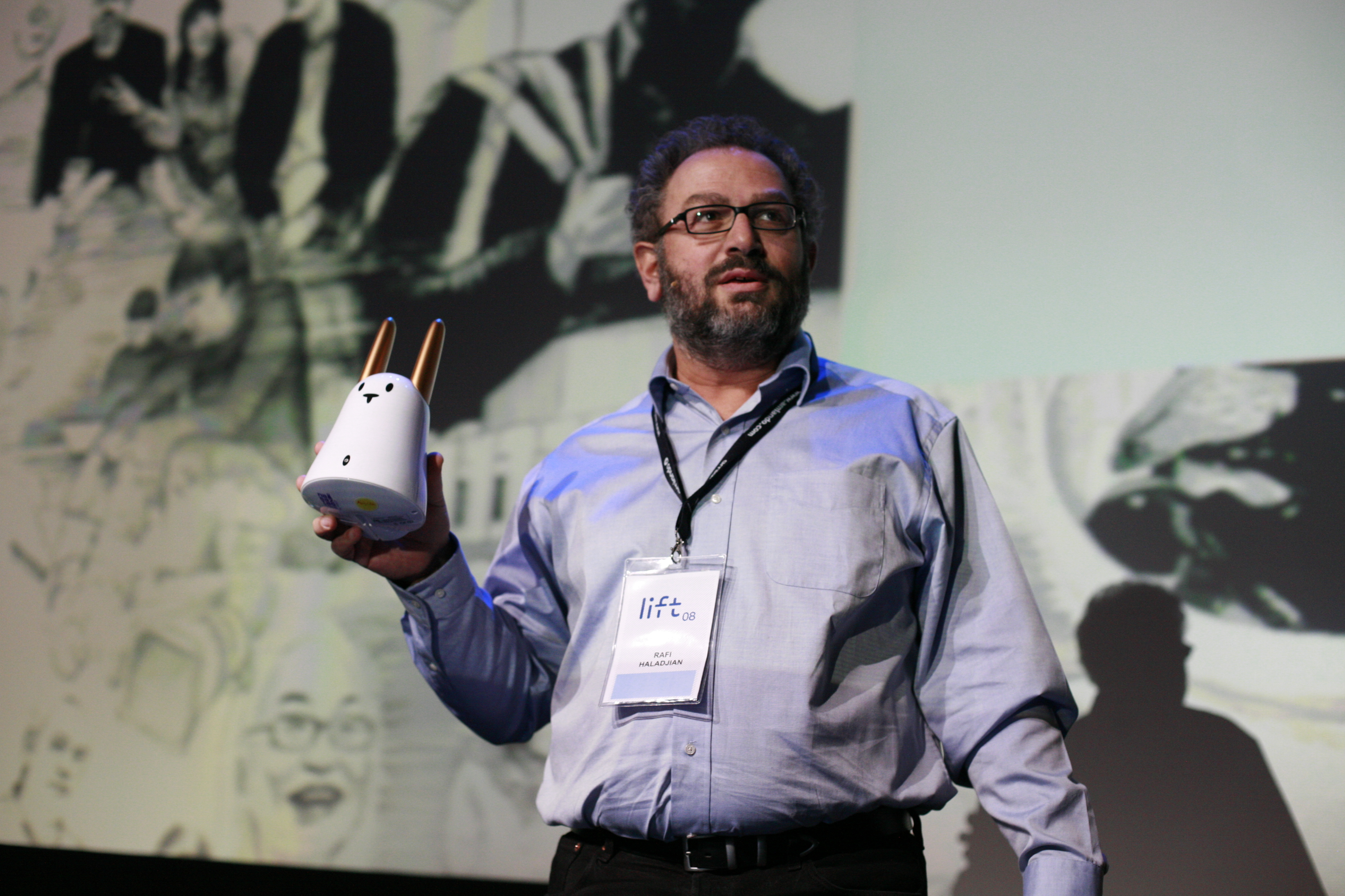 Րաֆֆի Հալաջյանը եւ Napaztag/tag-ը